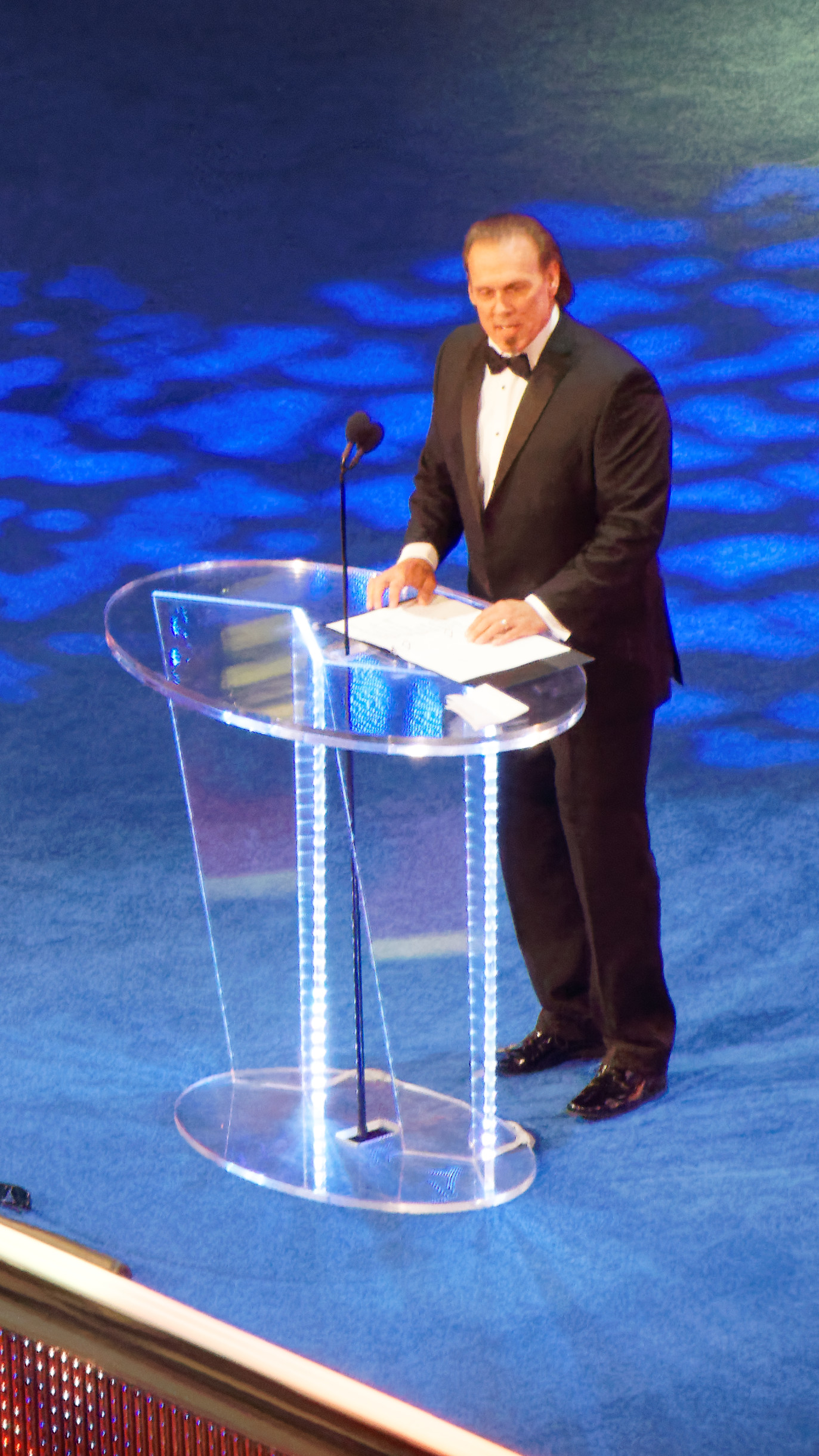 Le WWE Hall of Fame (anciennement WWF Hall of Fame) est une institution qui honore d'anciens employes de la World Wrestling Entertainment (anciennement World Wrestling Federation) et d'autres figures qui ont contribue au catch et au divertissement sportif en general. Sting (Steve Borden) Introduce By : Ric Flair Six fois WCW World Heavyweight Championship, deux fois NWA World Heavyweight Championship, deux fois WCW United States Championship et trois fois WCW World Tag Team Championship.